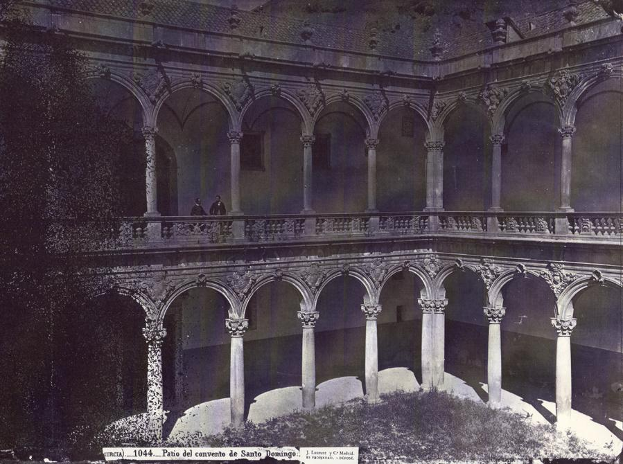 Claustre del col·legi de Sant Doménec/Santo Domingo d'Oriola, Baix Segura, País Valencià. Foto de Laurent (1816-1886).